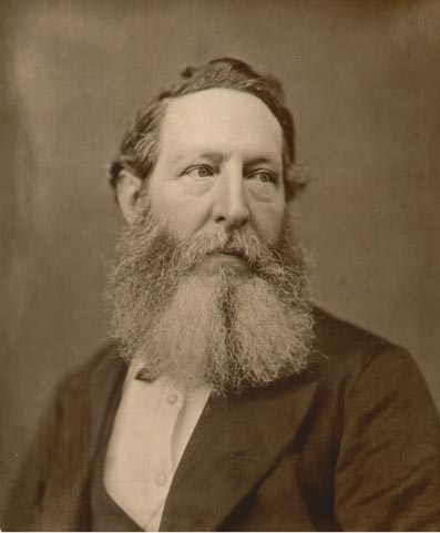 Photo - Portrait des Agostino Aglio (1816-1885)